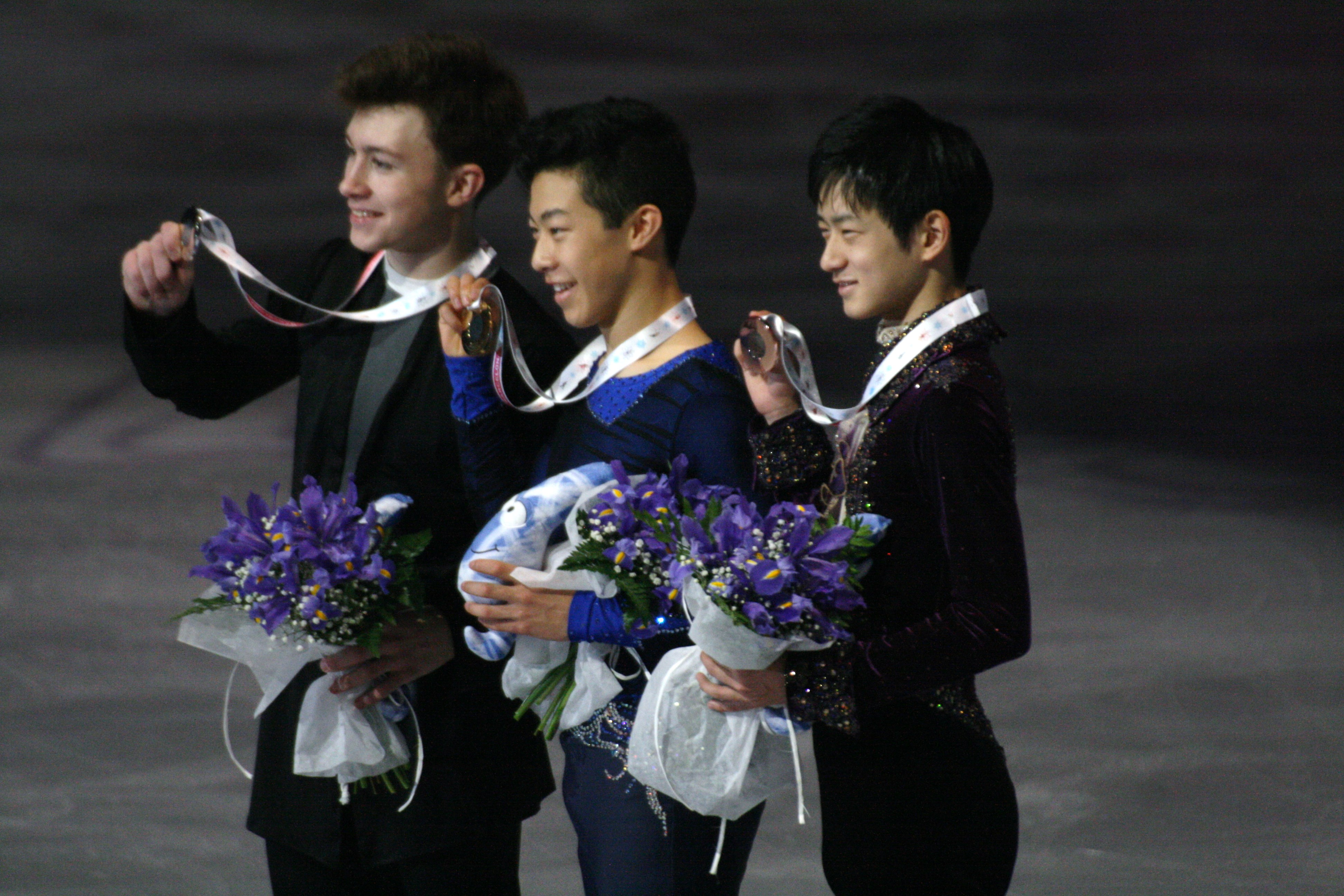 Церемония награждения в мужском одиночном катании на финале Гран-при по фигурному катанию среди юниоров 2015-2016. Слева на право: Дмитрий Алиев (Россия) - 2е мместо, Нэйтан Чен (США) - 2е место, Сота Ямомото (Япония) - 3е место.